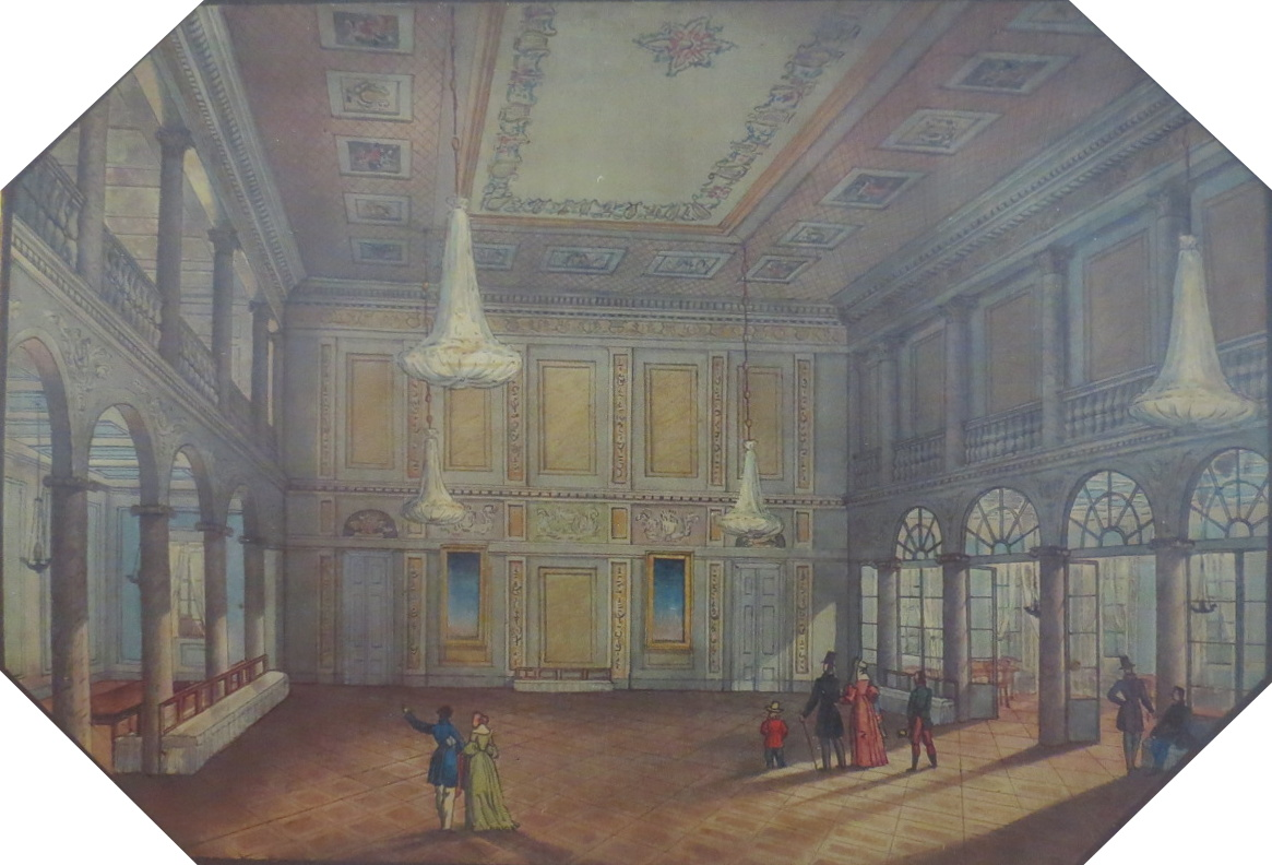 Notranjost kazine - plesna dvorana v prvem nadstropju.